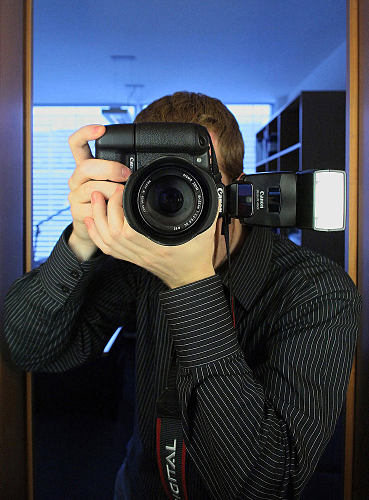 Markus Hammes (Benutzer:Fox-Two, eigenes Foto).